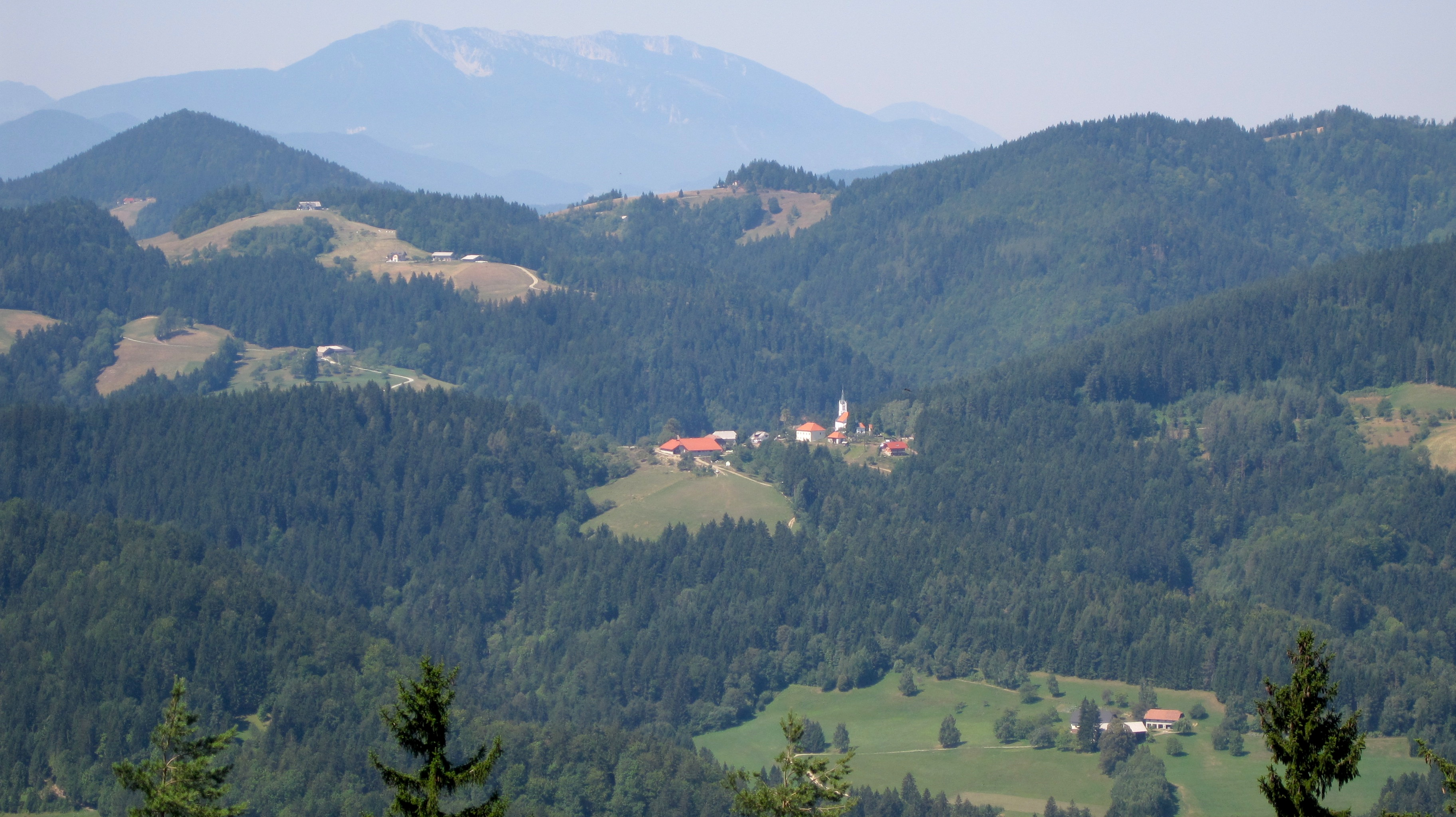 Sv. Primož na Pohorju, v ozadju Peca